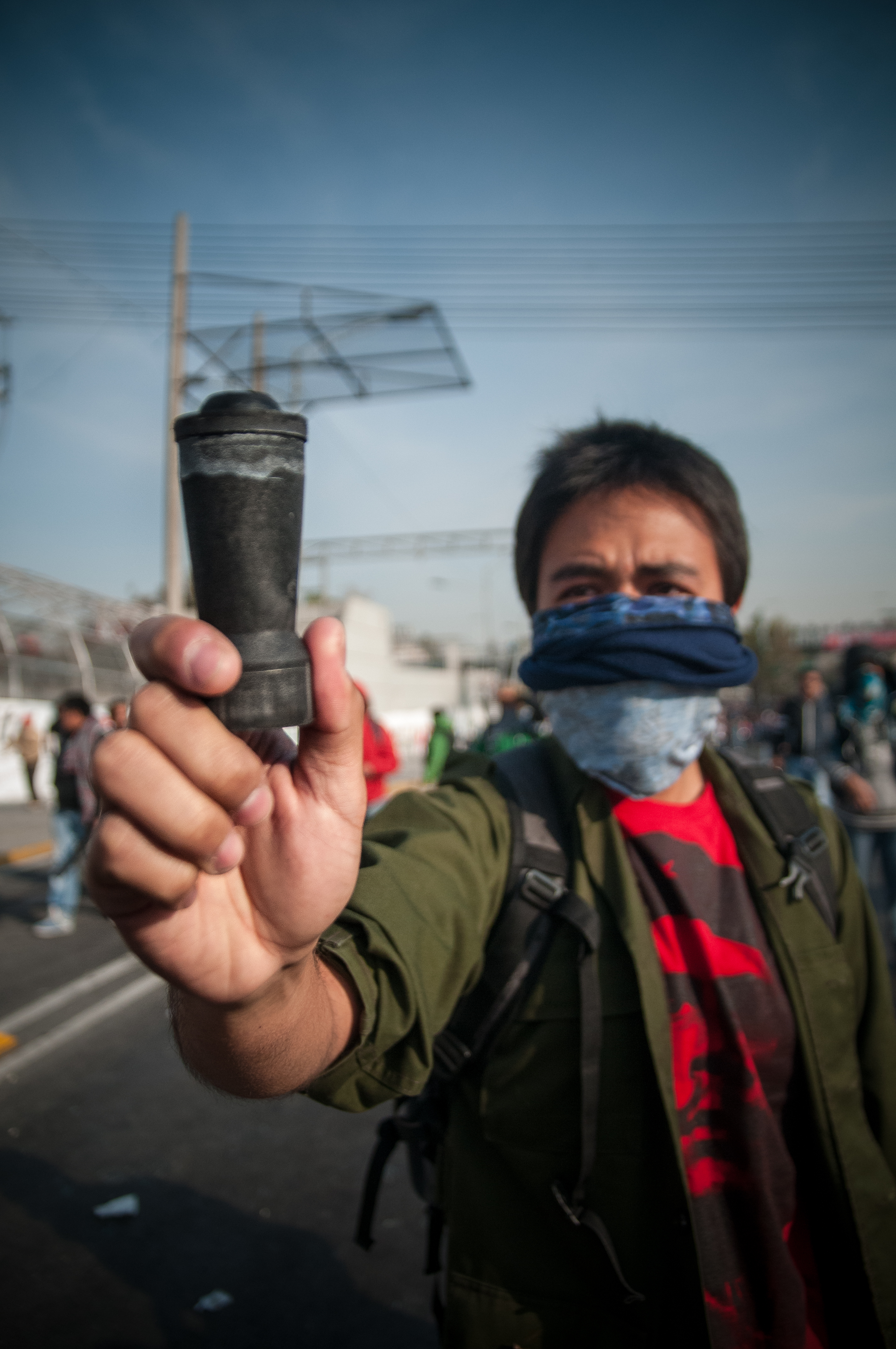 Mientras, la policía reprimía disparando estas balas de goma directamente a los cuerpos de los manifestantes: no hacia el aire, no para dispersar. El objetivo era herir, y eso lograron. La policía y el ejército instalaron un cerco alrededor de San Lázaro para proteger a quien ellos consideran presidente de México. Grupos de estudiantes, maestros y sociedad civil se reunieron afuera del cerco para intentar derribar las vallas y acceder a las inmediaciones de la Cámara de Diputados para protestar contra la imposición. Estos intentos fueron recibidos con represión: gases lacrimógenos y balas de goma fueron disparados contra los cuerpos de los manifestantes resultando en más de 30 heridos (varios de gravedad).